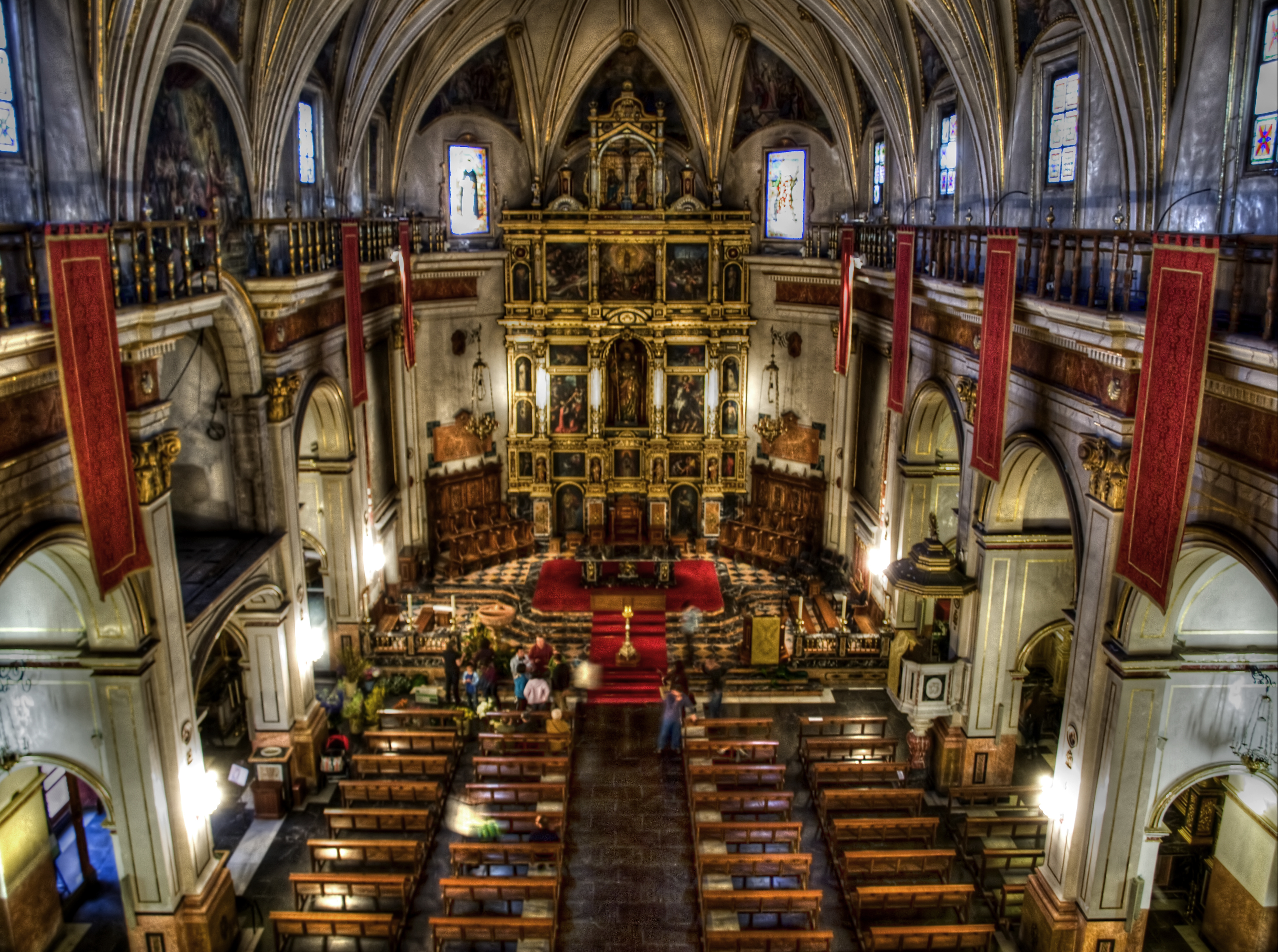 Iglesia parroquial de San Jaime Apóstol